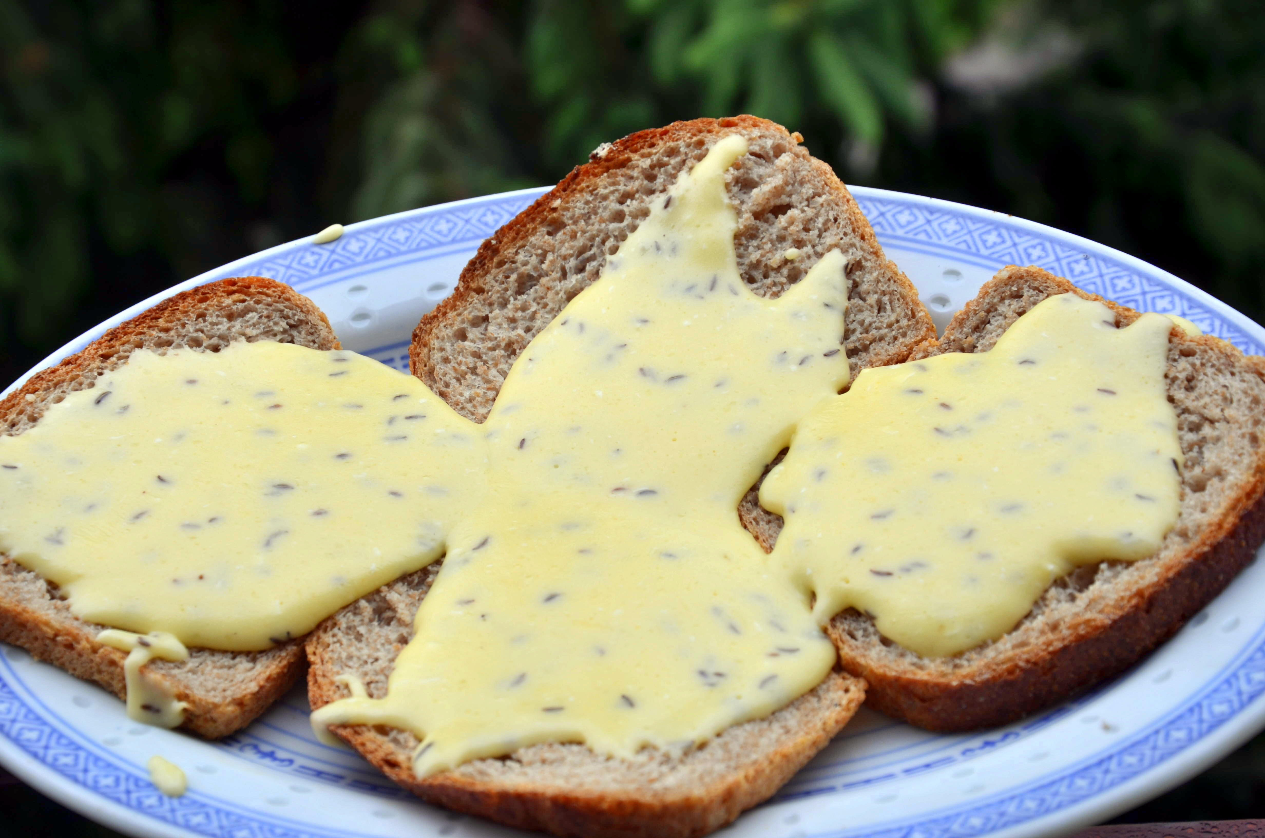 Kochkäse